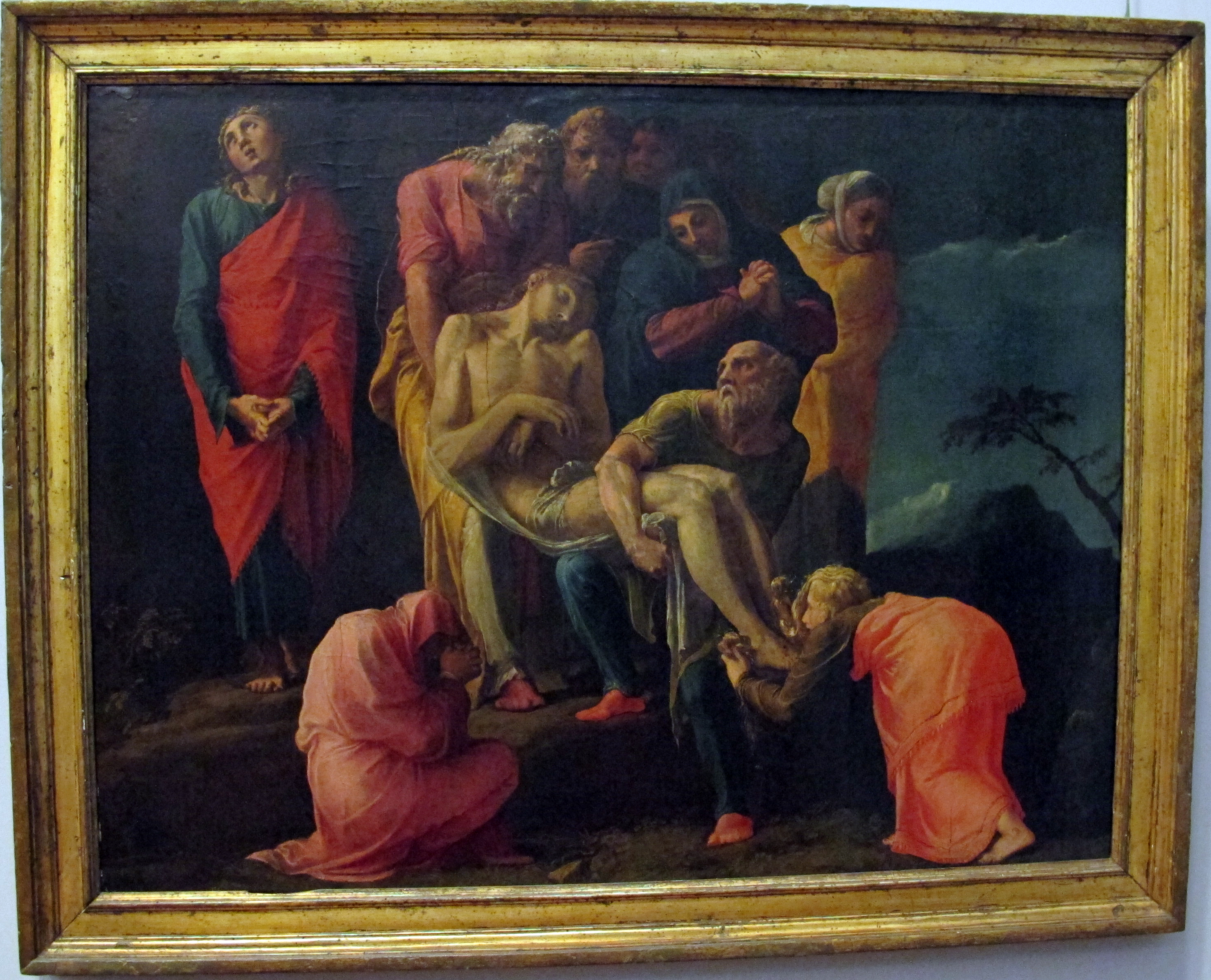 Galleria Napoletana (Museo di Capodimonte)